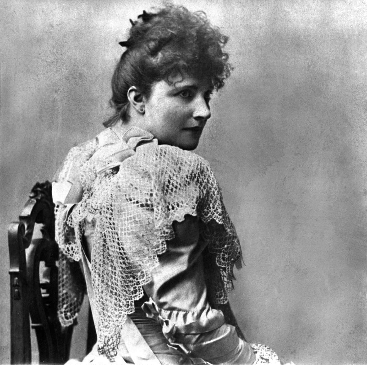 Actrice Théo Mann-Bouwmeester op 26-jarige leeftijd.